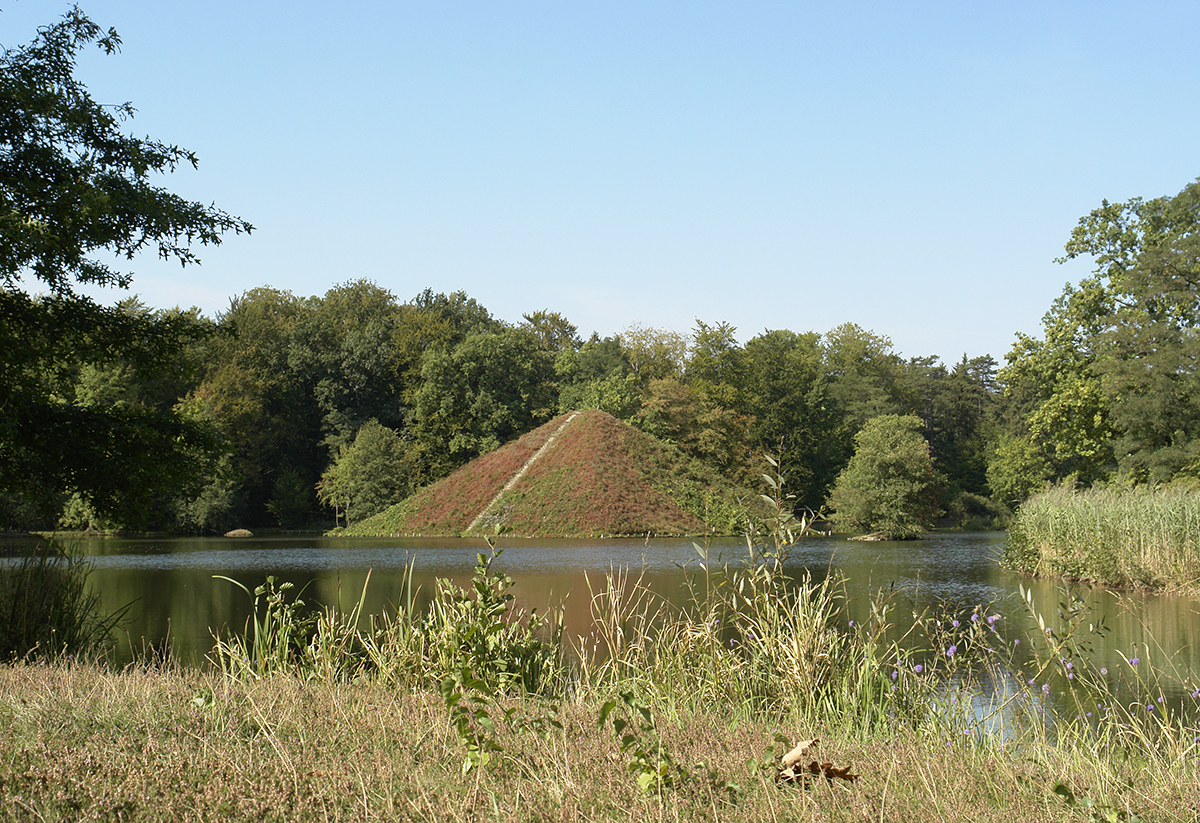 Branitz Park, Pyramide